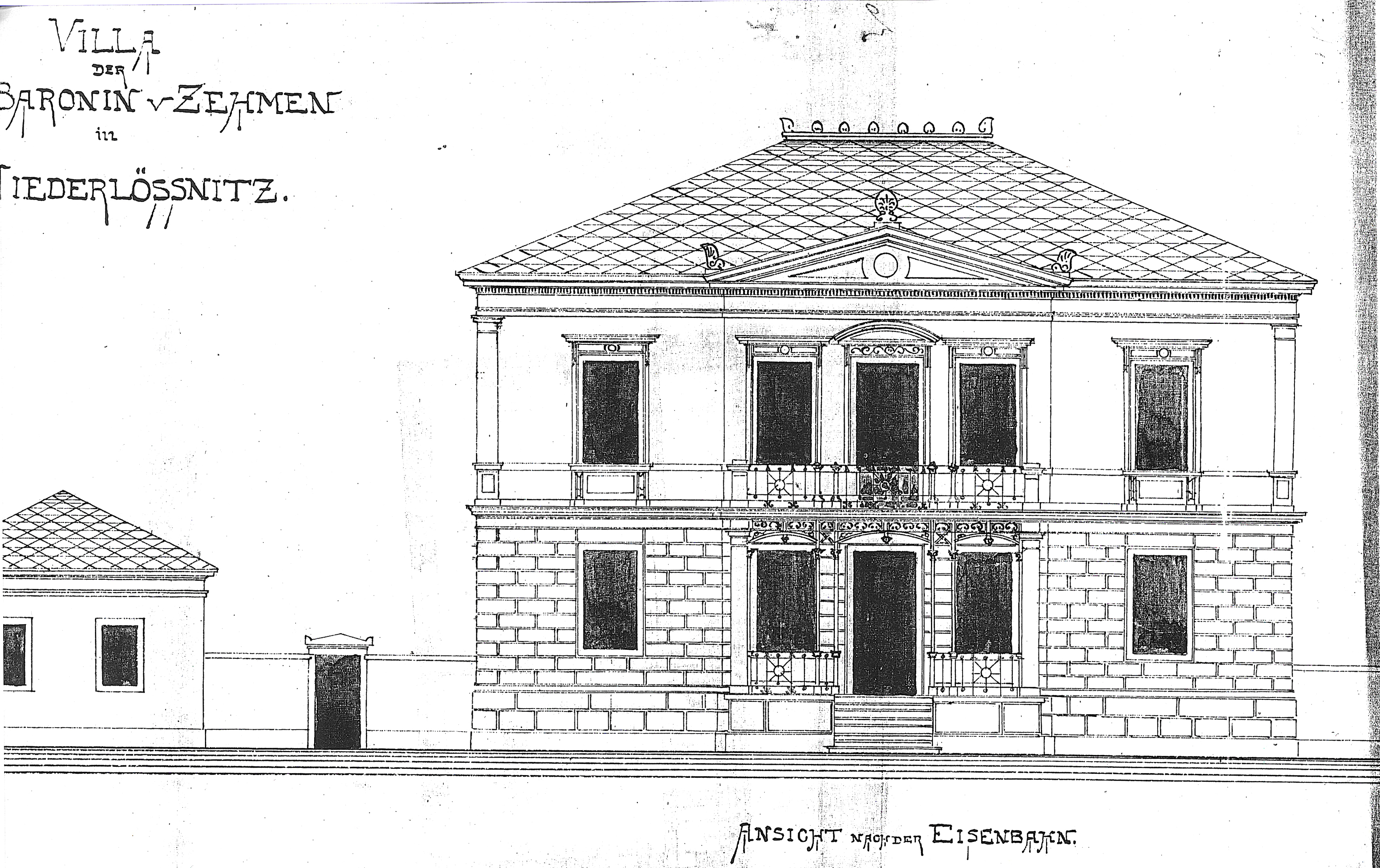 Radebeul, Villa Tanger: Villa für Baronin Zehmen: Entwurf der Gebrüder Ziller, 1873, Südseite